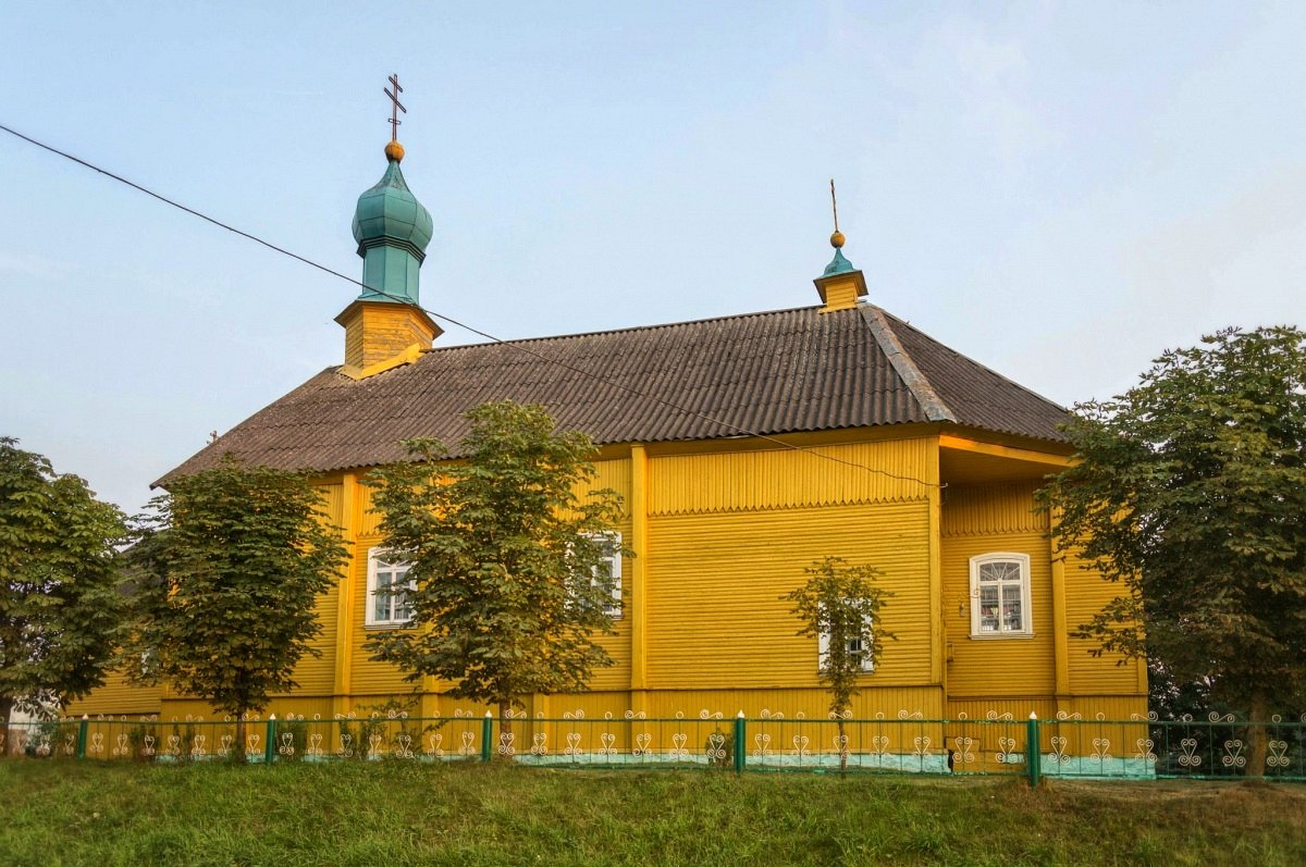 Верхняе. Спаса-Праабражэнская царква